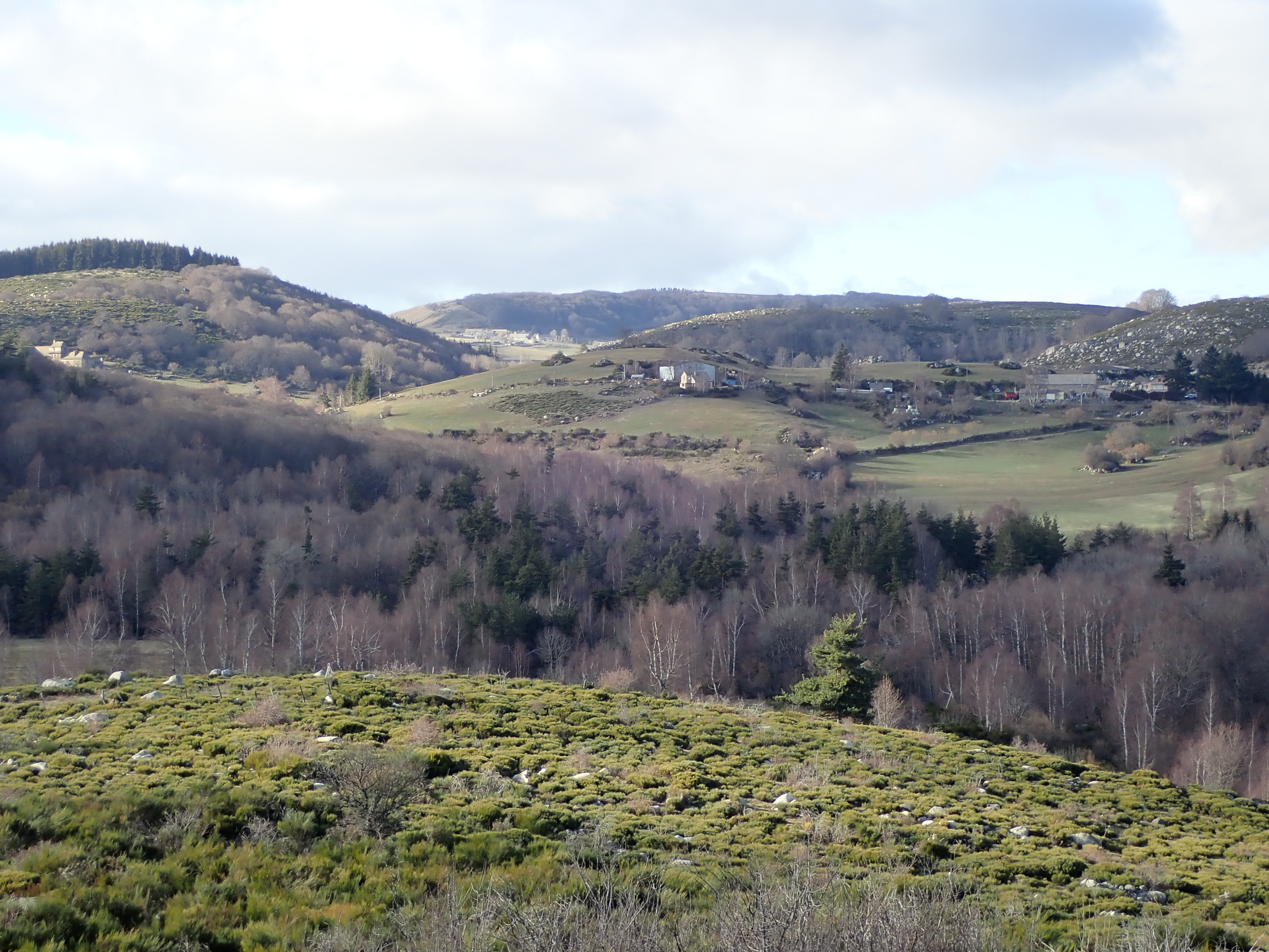 Vue sur la ferme du Sauvage à droite, la ferme de Bonalbert à gauche et le village de Taupinet à l'arrière plan (commune de Saint-Laurent-de-Muret, Lozère)